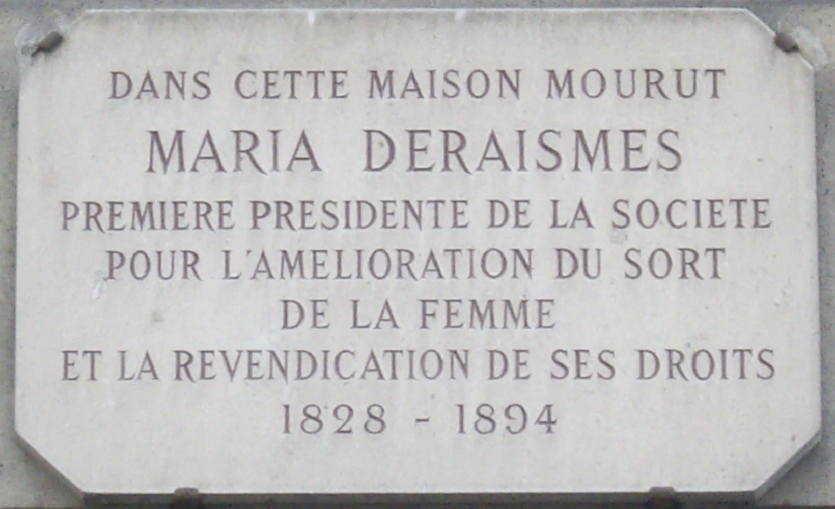 Plaque commémorative, 72 rue Cardinet, Paris 17e. « Dans cette maison mourut Maria Deraismes, première présidente de la Société pour l'amélioration du sort de la femme et la revendication de ses droits, 1828-1894. »